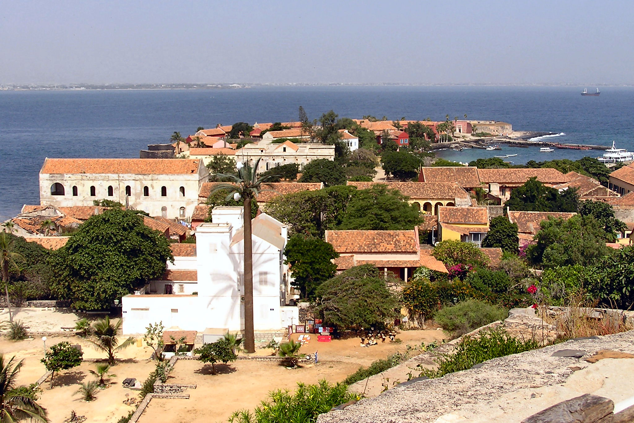 Village de Gorée